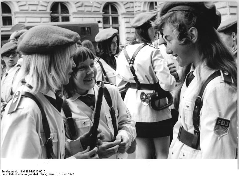 ADN-ZB Katscherowski 16.6.1972 Schwerin: 14. Arbeiterfestspiele. Birgit, Martina und Marina (vlnr) gehören zum Spielmannszug der Berliner "Egon-Schulz-Oberschule", der im Zentralen Musikkorps der FDJ- und Pionierorganisation auftritt.